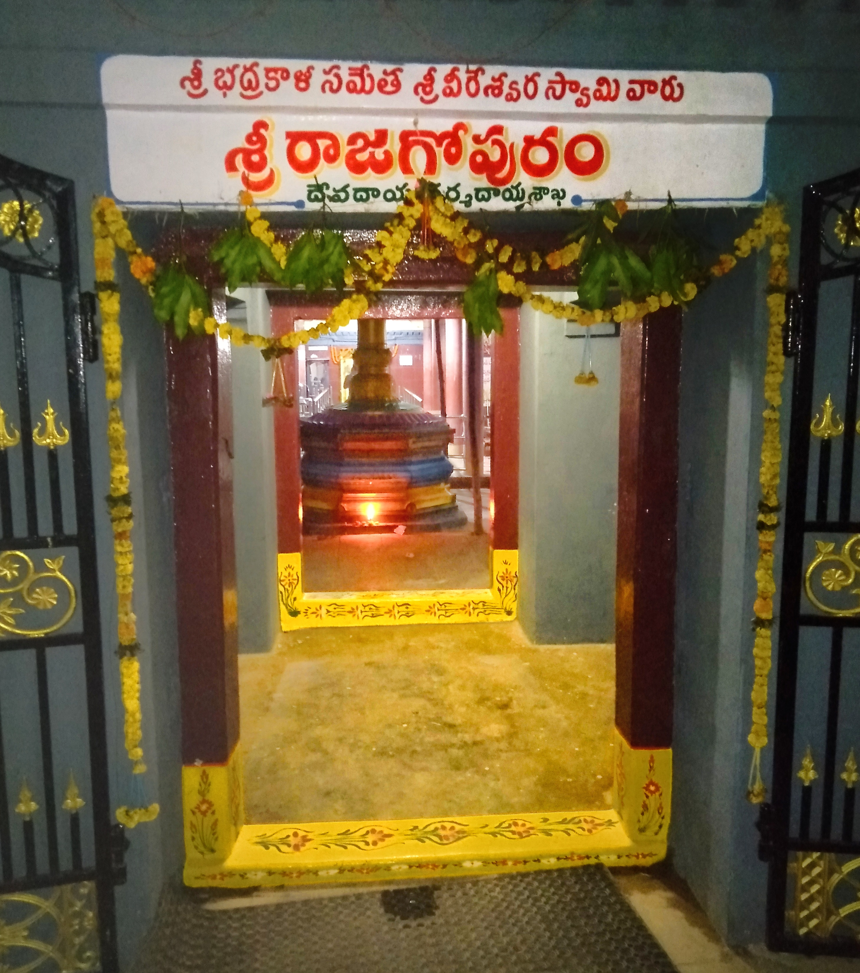 శ్రీ భద్రకాళీ సమేత శ్రీ వీరేశ్వరస్వామి దేవాలయం రాజగోపురం